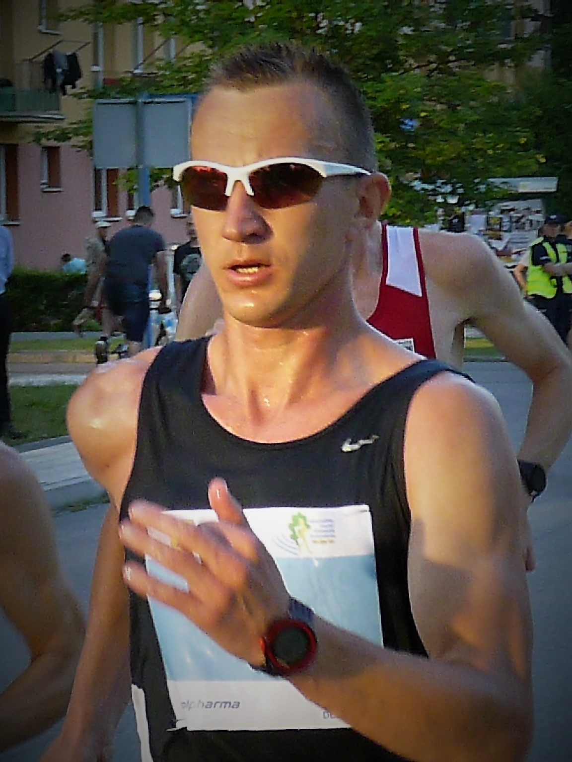 Artur Brzozowski, Nowa Dęba 2017-06-18